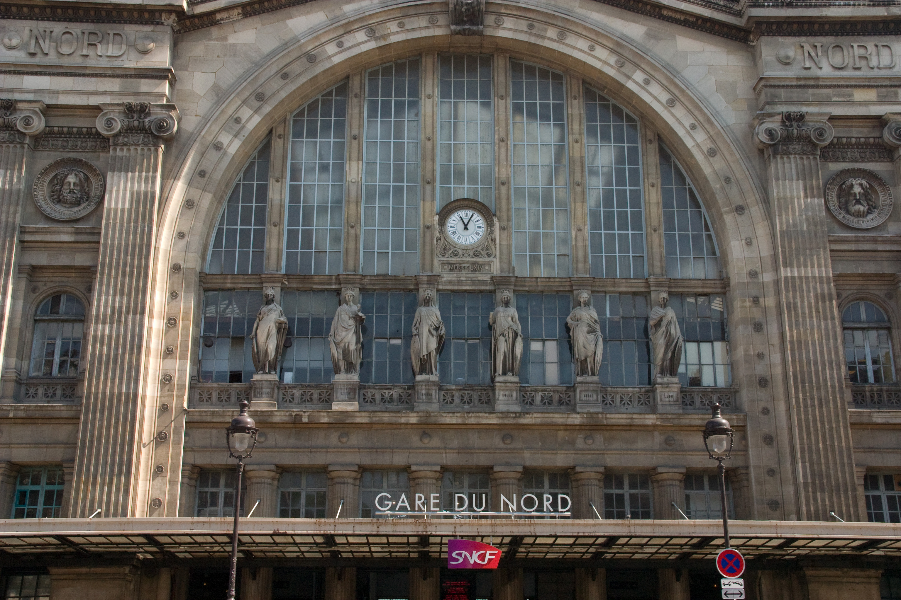 Gare du Nord, Paris, France